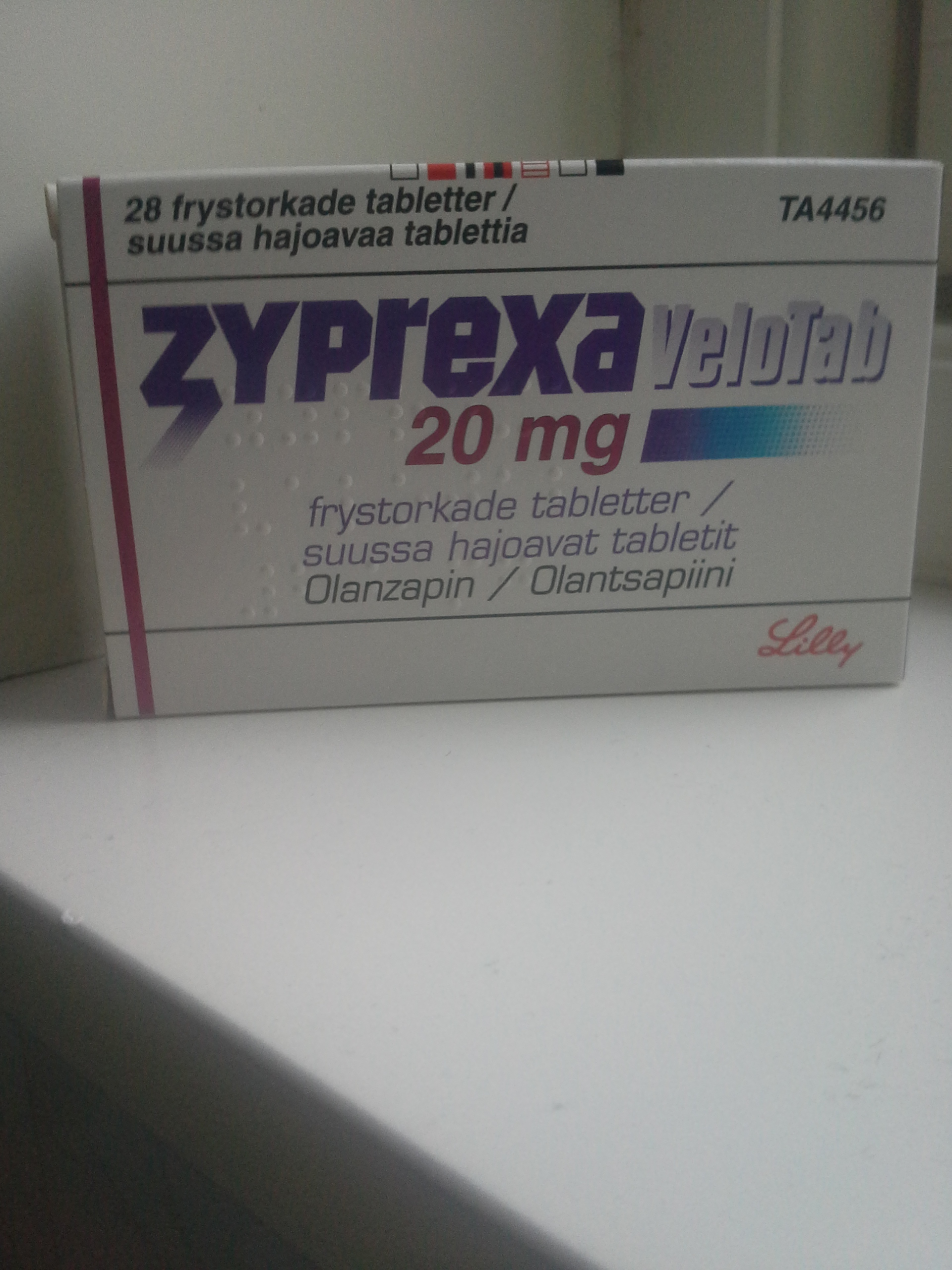 Zyprexa, munlösliga 20 mg-tabletter.